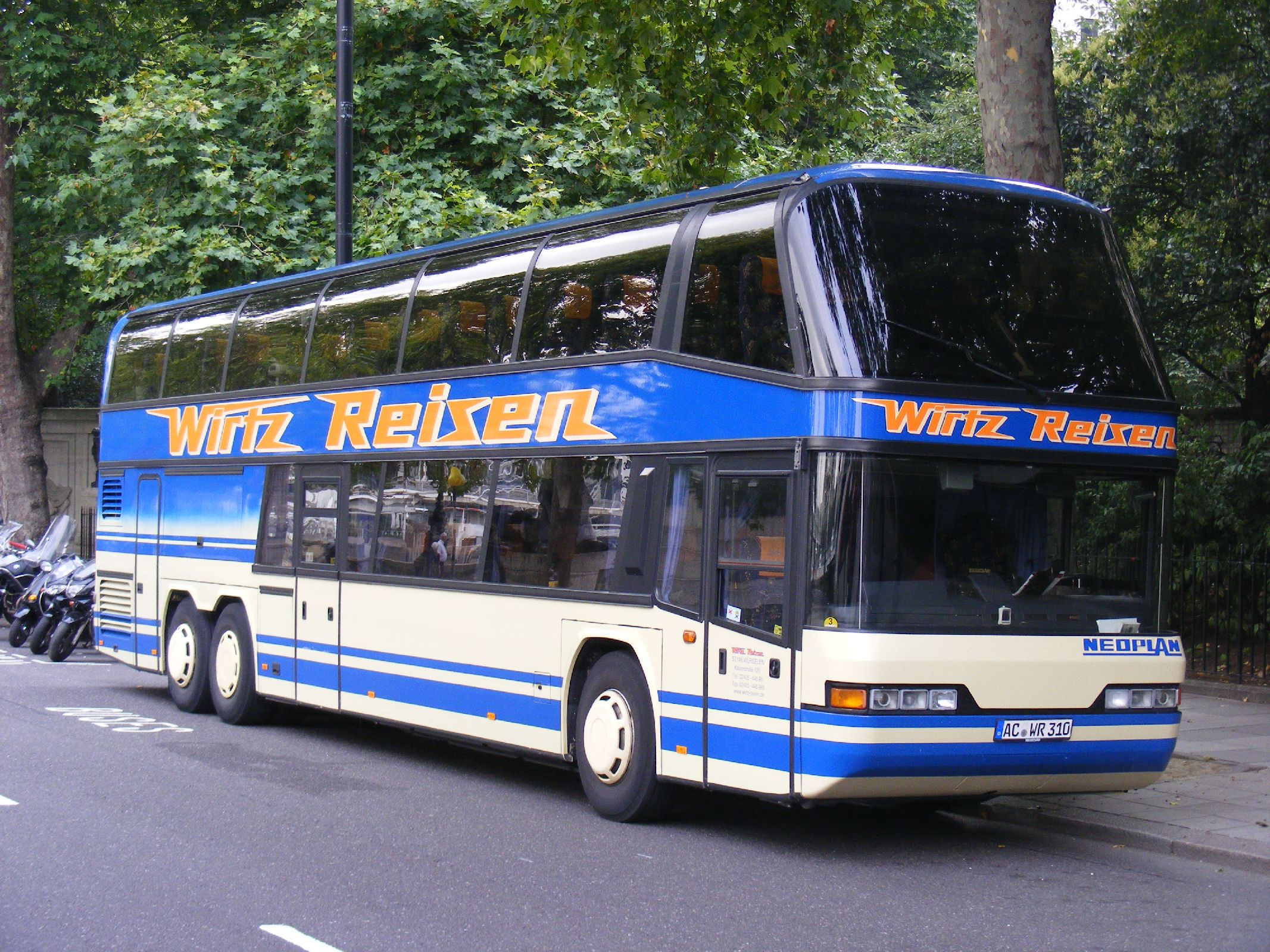 Reisebüro Wirtz KG Kaiserstraße 120 52146 Würselen, Germany. AC registration for Aachen